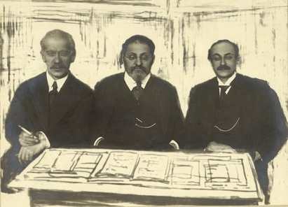 תצלום קבוצתי של שלושה מבכירי העתונאים היהודים ברוסיה, וממנהיגי הציונות הרוסית. מימין לשמאל: מיכאל אלייניקוב (Михаил Семенович Алейников), -דב גולדברג (Борис Александрович Гольдберг) ועורך העתון "רזסויט", אברהם אידלסון (Абрам Давидович Идельсон). על התצלום לא צויינו מקום או זמן הפקתו, אך יש להניח כי הוא צולם בפריס, בשנת 1919, בעת שהשלושה ייצגו את יהדות רוסיה ואוקראינה ב"ועד המשלחות היהודיות" שהופיעו לפני ועידת השלום שנערכה בוורסאי, בעקבות מלחמת העולם הראשונה.